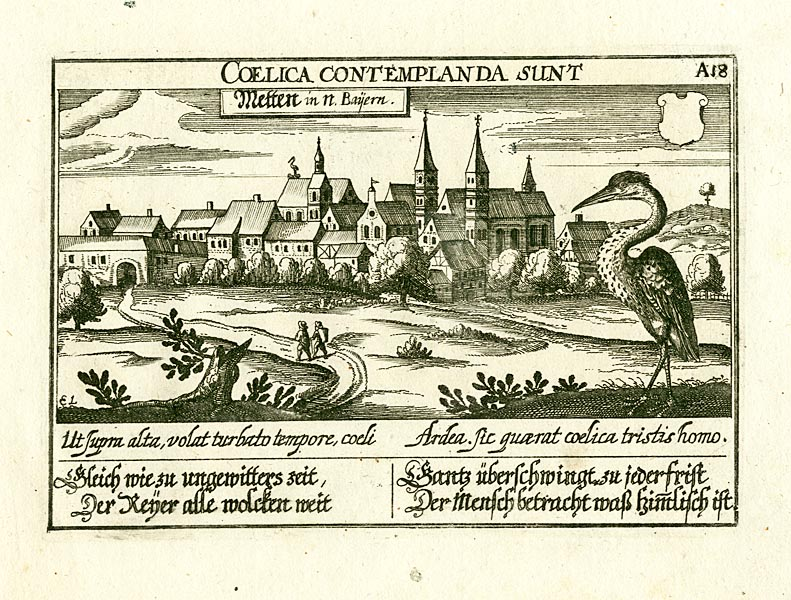 aus Daniel Meisner's Schatzkästlein "Metten in N. Bayern". Kupferstich (eigentlich Kupferradierung) aus Daniel Meisner’s Schatzkästlein. Ausgabe bei Paul Fürst, Nürnberg, erschienen zwischen 1637-1678.